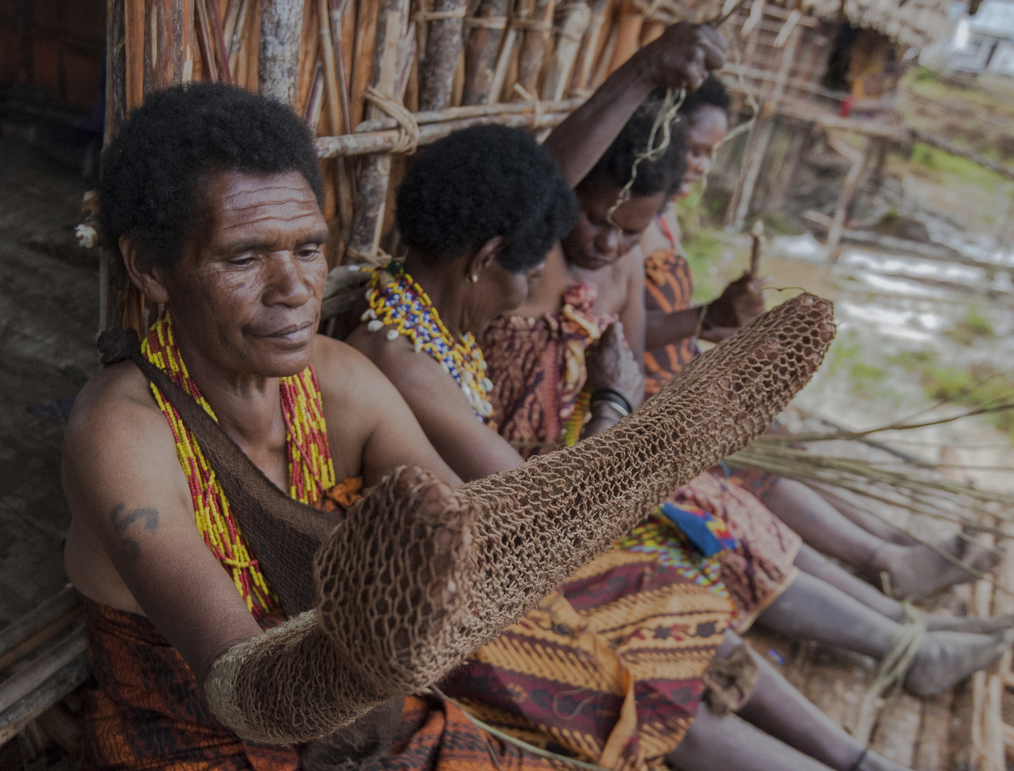 Noken Adalah Tas Yang Terbuat Dari Kulit Kayu, Noken Ini Menjadi Sebuah Kebanggaan MAsyarakat Papua Karna Ke Unikannya Hingga Di Nobatkan Sebagai Warisan Budaya Dunia Oleh UNESCO